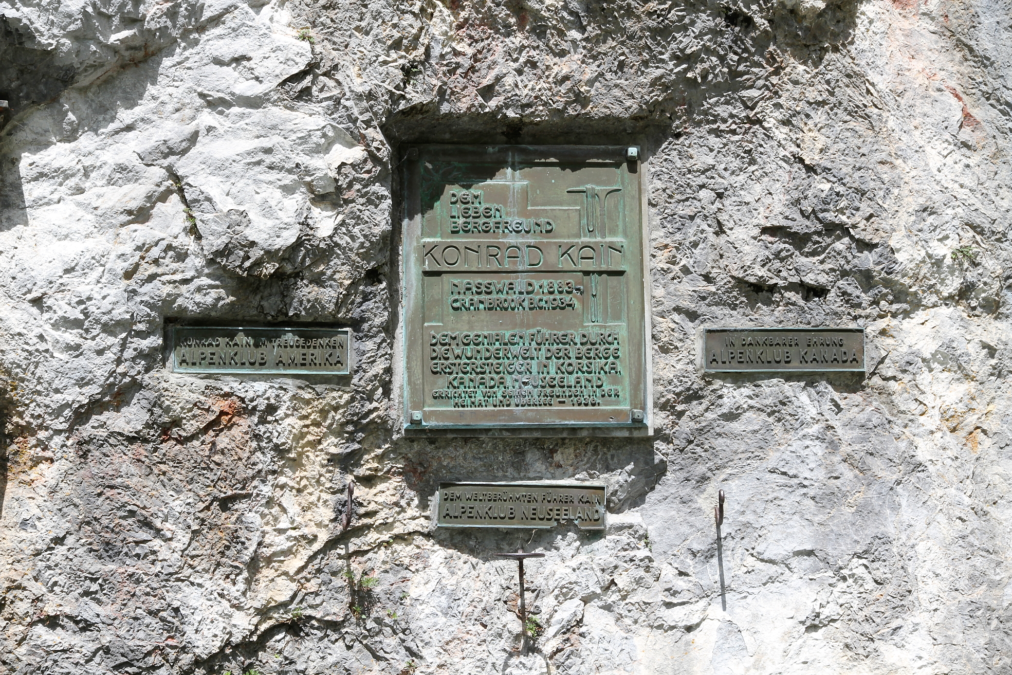 Konrad-Kain-Gedenktafeln bei einem Rastplatz im Reißtal in Hinternaßwald, ein Ortsteil der niederösterreichischen Marktgemeinde Schwarzau im Gebirge.